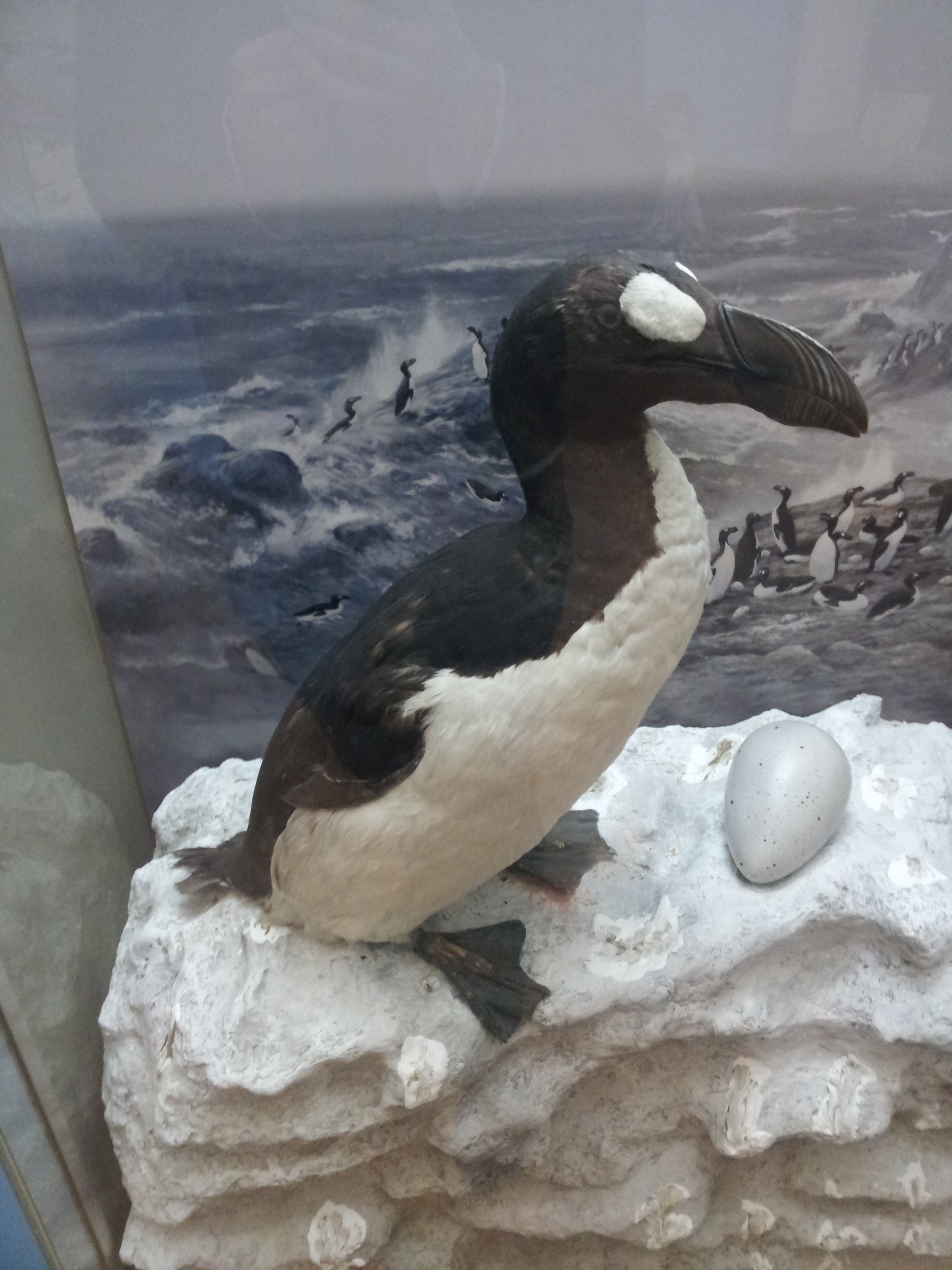 Präparat im Landesmuseum Hannover, Great Auk no. 41, the "Hanover Auk", per Fuller 1999.